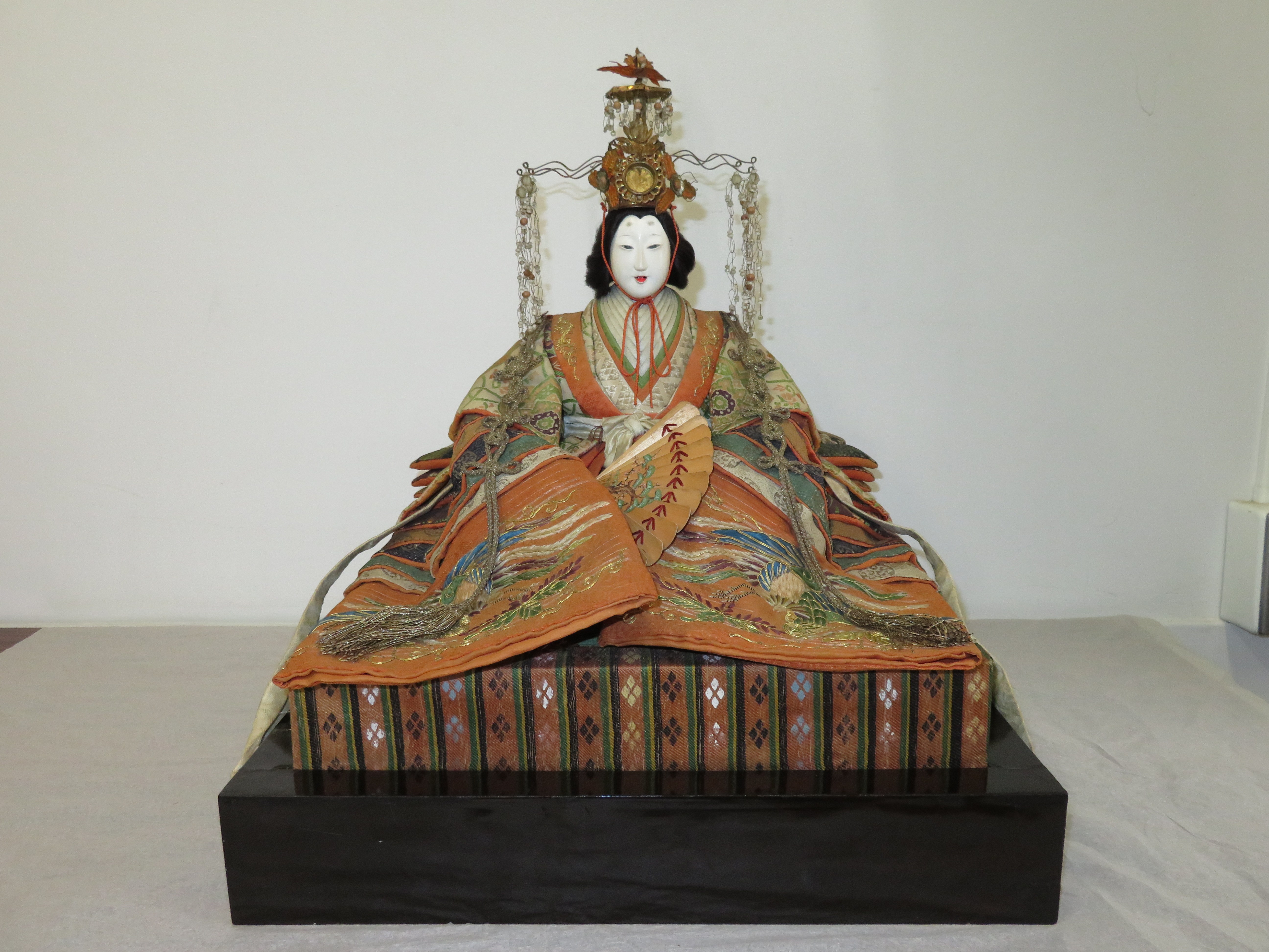 2018年2月27日-3月18日 東京国立博物館展示風景